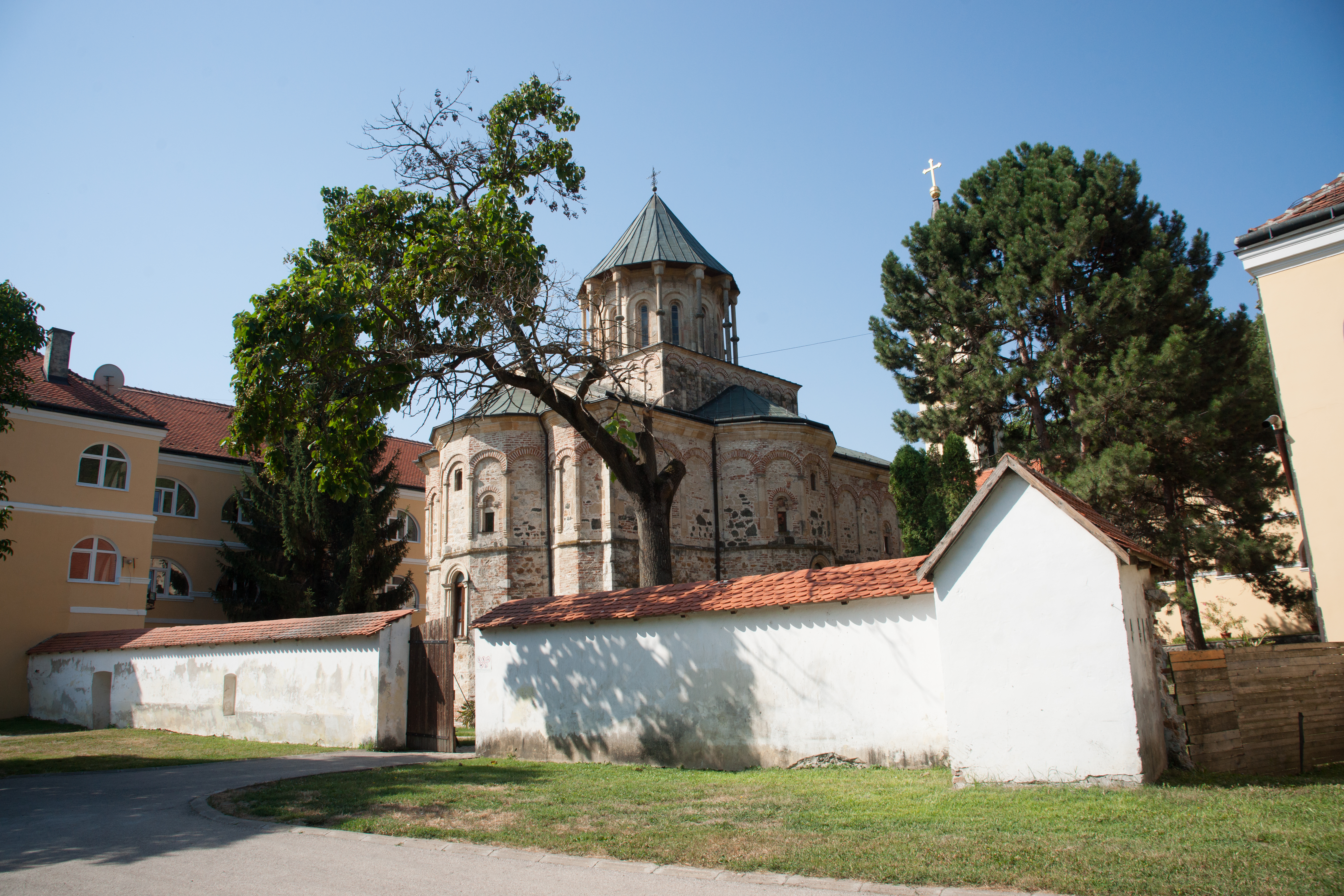 Novo Hopovo monastery